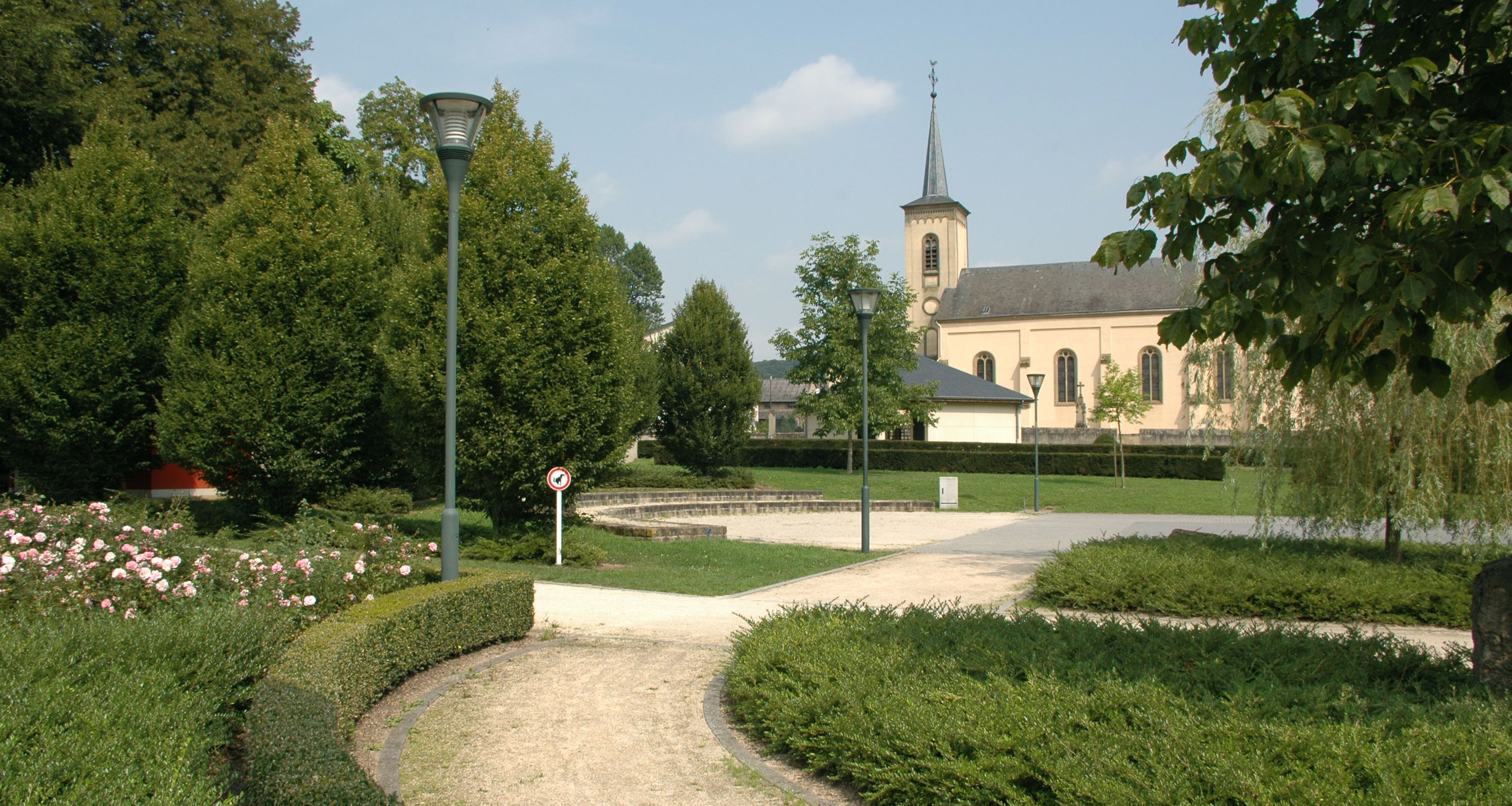 De Park zu Bur (Mompech)